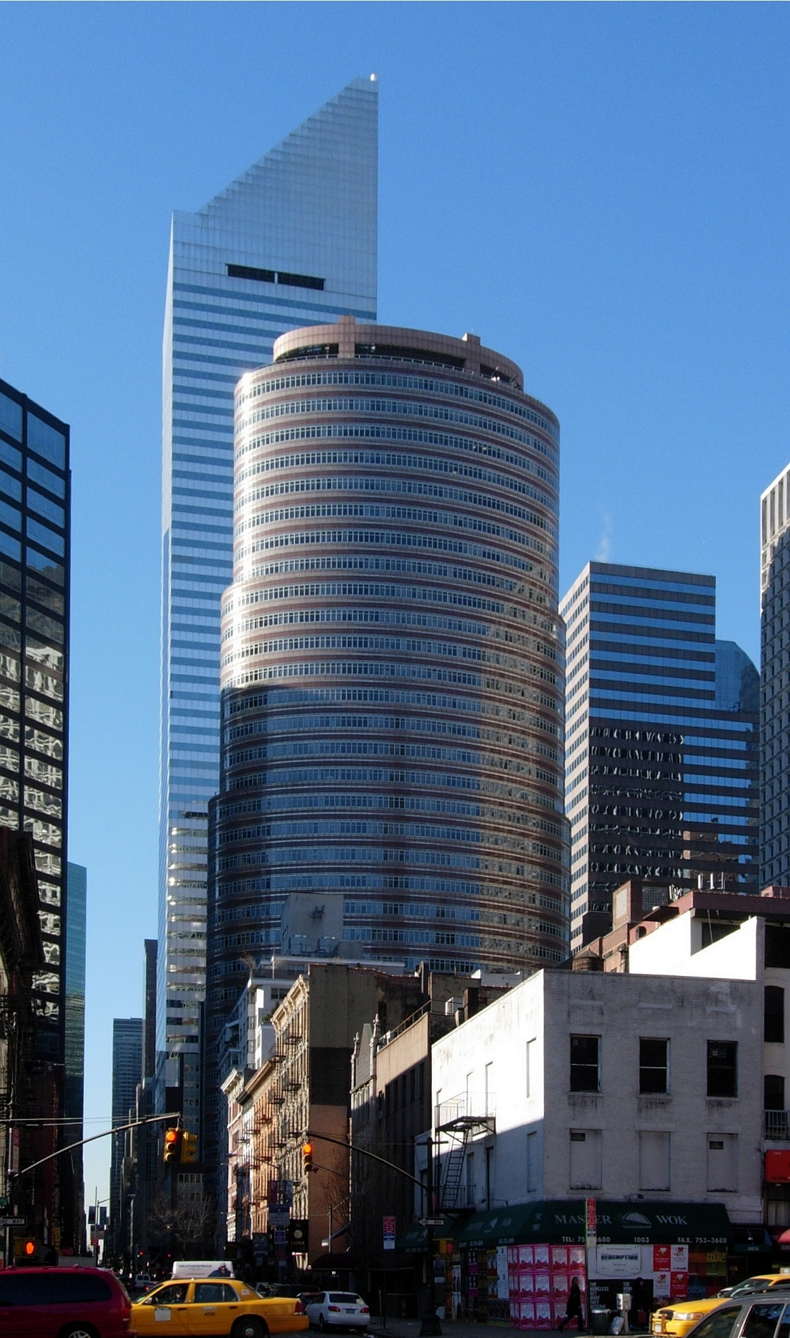 juste à coté de chez Bibi